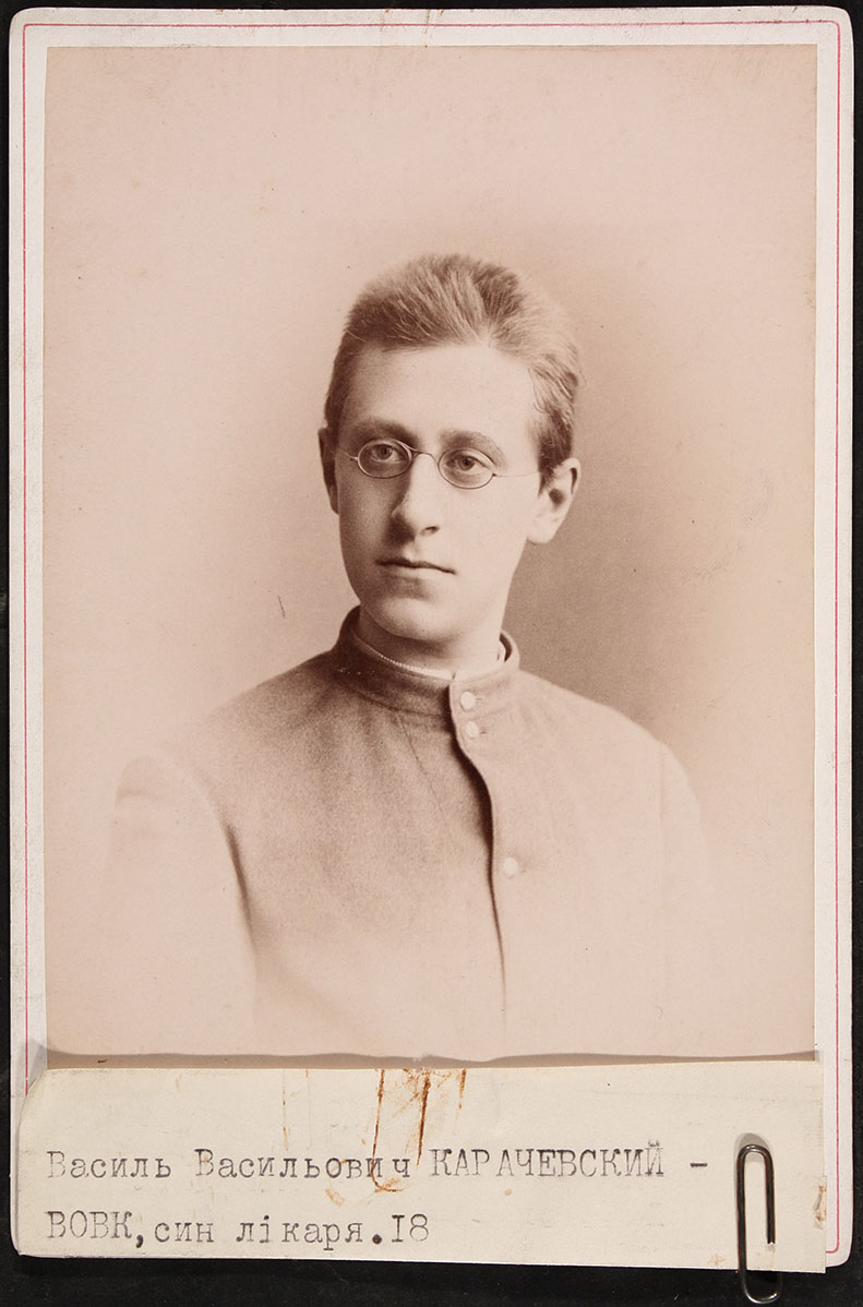 Василь Васильович Вовк-Карачевський — громадський діяч, син В.Н.Вовка-Карачевського Фотографія В.Висоцького. Київ. [Поч. 1890-х рр.] Інститут рукопису НБУВ